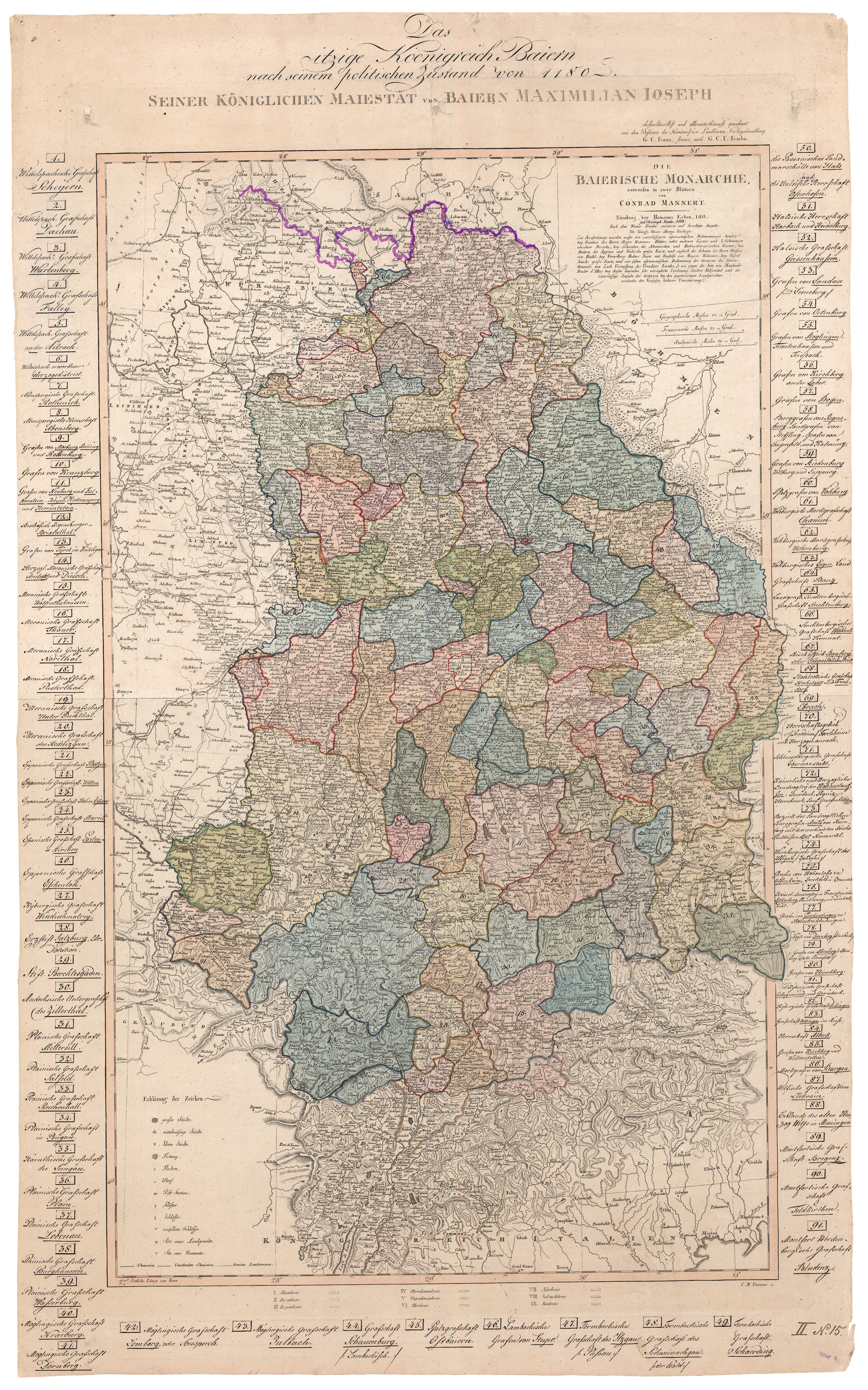 Alte Karte von 1811 zeigt Bayern im Jahr 1180, mit Untergliederung nach Herrschaftsgebieten (ähnliche Karte)